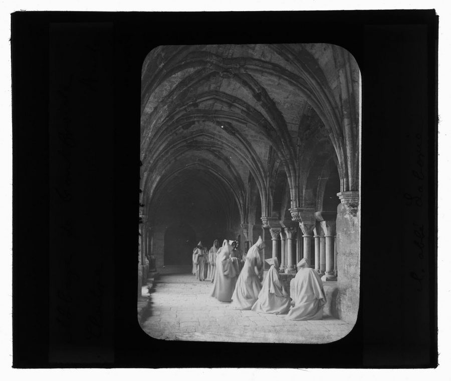 Abbaye Sainte-Marie de Fontfroide à Narbonne (Aude). Entre 1858 et 1907. Vue d'un groupe de moines à l'intérieure du cloître de l'abbaye. Au premier plan rangée de moines, vue de dos, regards vers extérieur, costumes religieux, cape, ; au second plan colonnes, arcades, plafond. Mention manuscrite : « C. abbé Laborie ». Etiquette imprimée : « E. Trutat N° ».